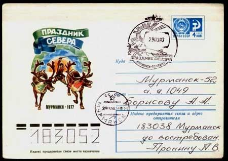 Конверт "Праздник Севера"